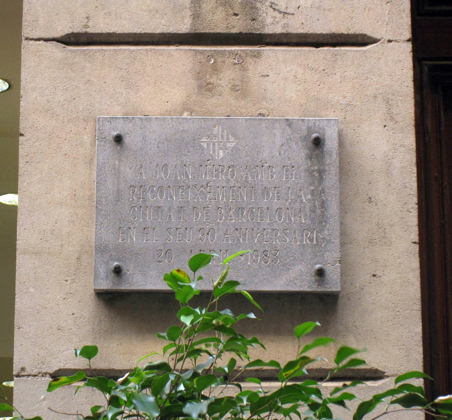 90 aniversari Joan Miró. Passatge del Crèdit, 2 (Barcelona)